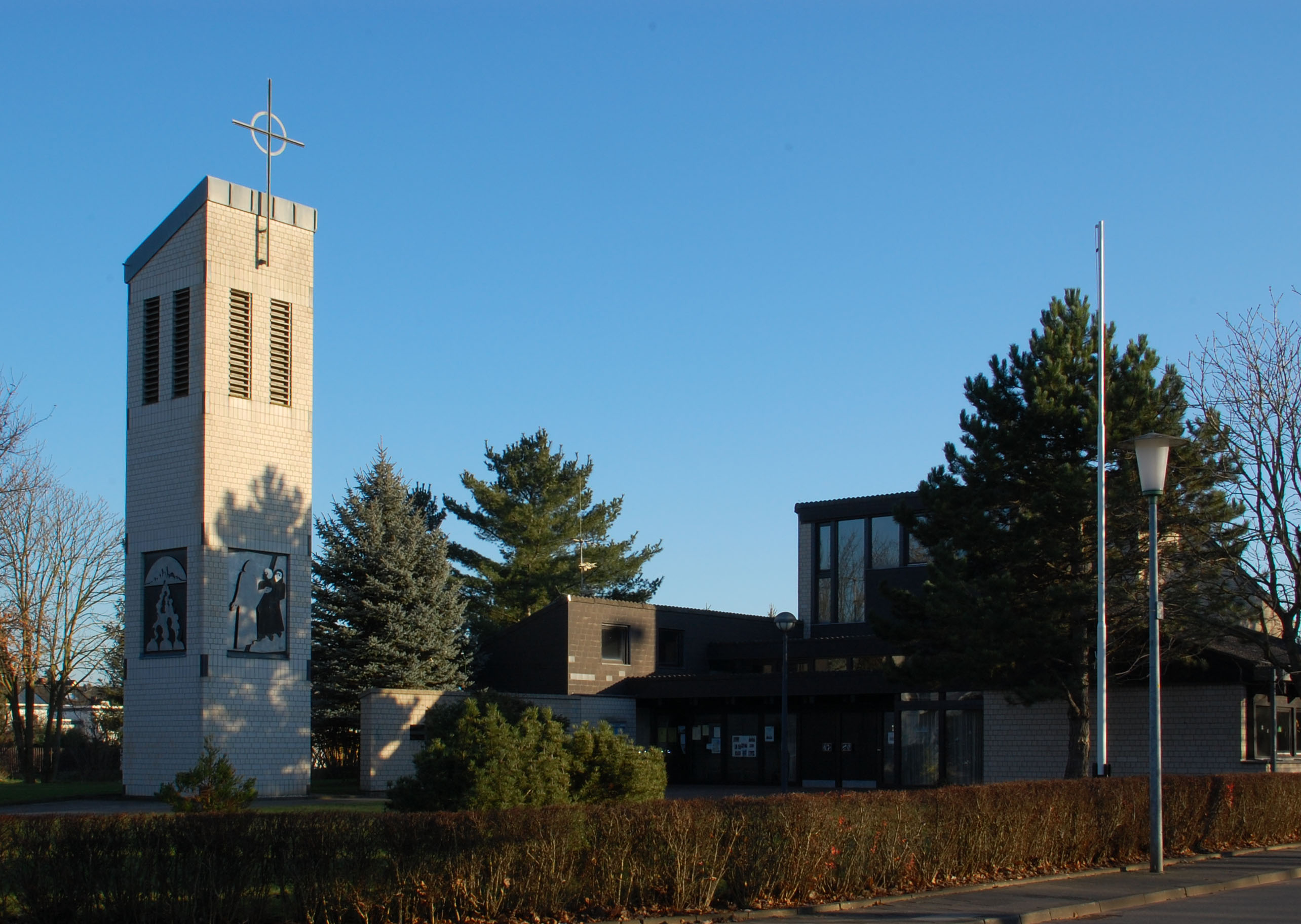 Emmaus-Kirche, Erftstadt-Gymnich